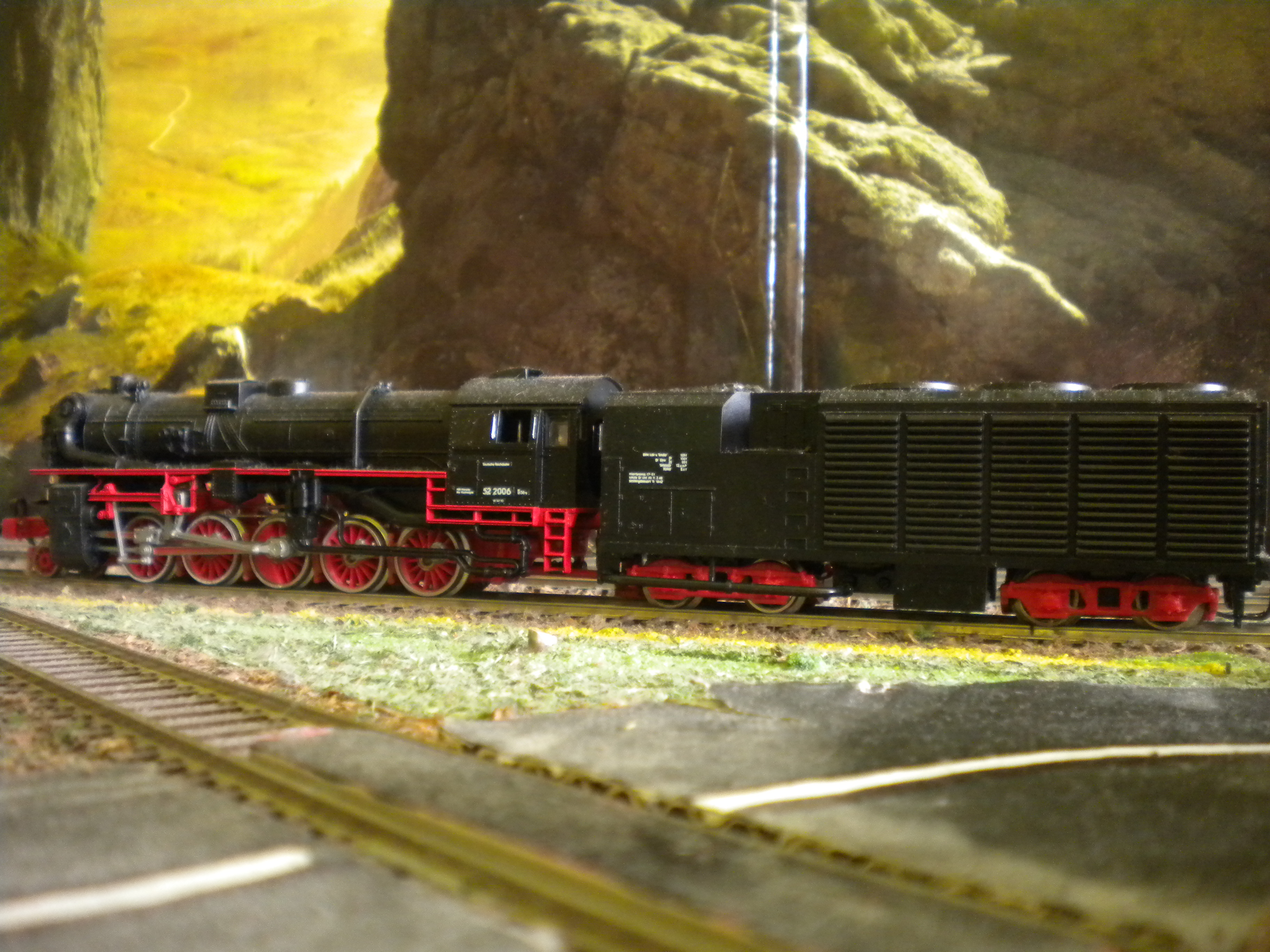 Dampflokomotive 52 2006 piko